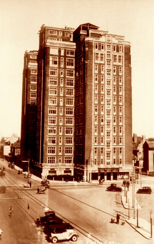 中文（中国大陆）: 上海华懋公寓旧景